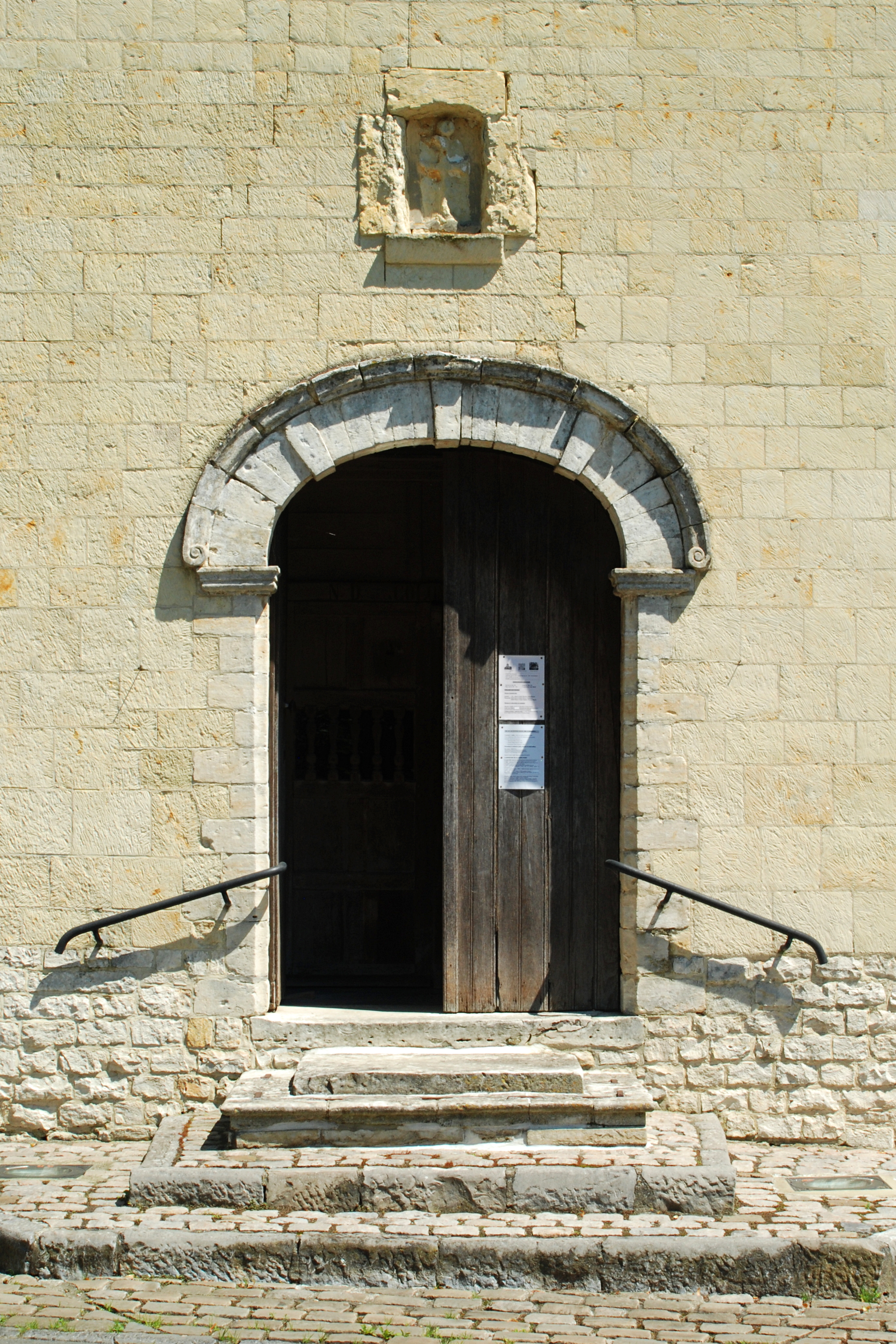 Belgique - Brabant wallon - Hélécine - Linsmeau - Chapelle Notre-Dame de la Colombe